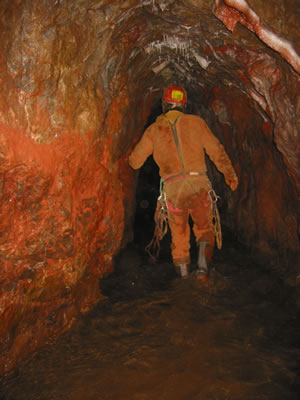 Sogenannter „Rom-Stollen“ in der ehemaligen Eisenerzgrube „Rom“ im Naturschutzgebiet „Oberhagen“ in Warstein